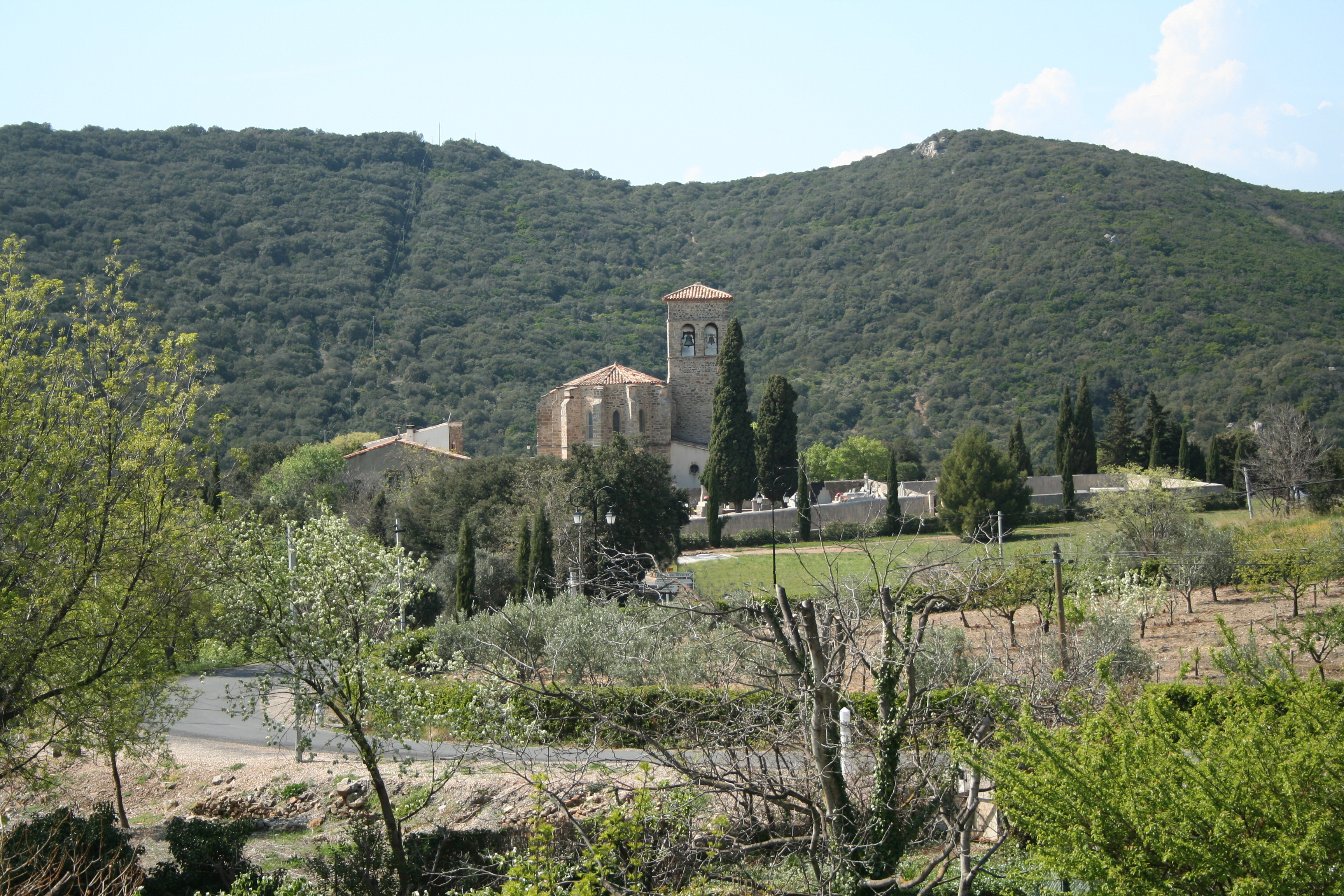 Vailhan (Hérault)- église Notre-Dame.